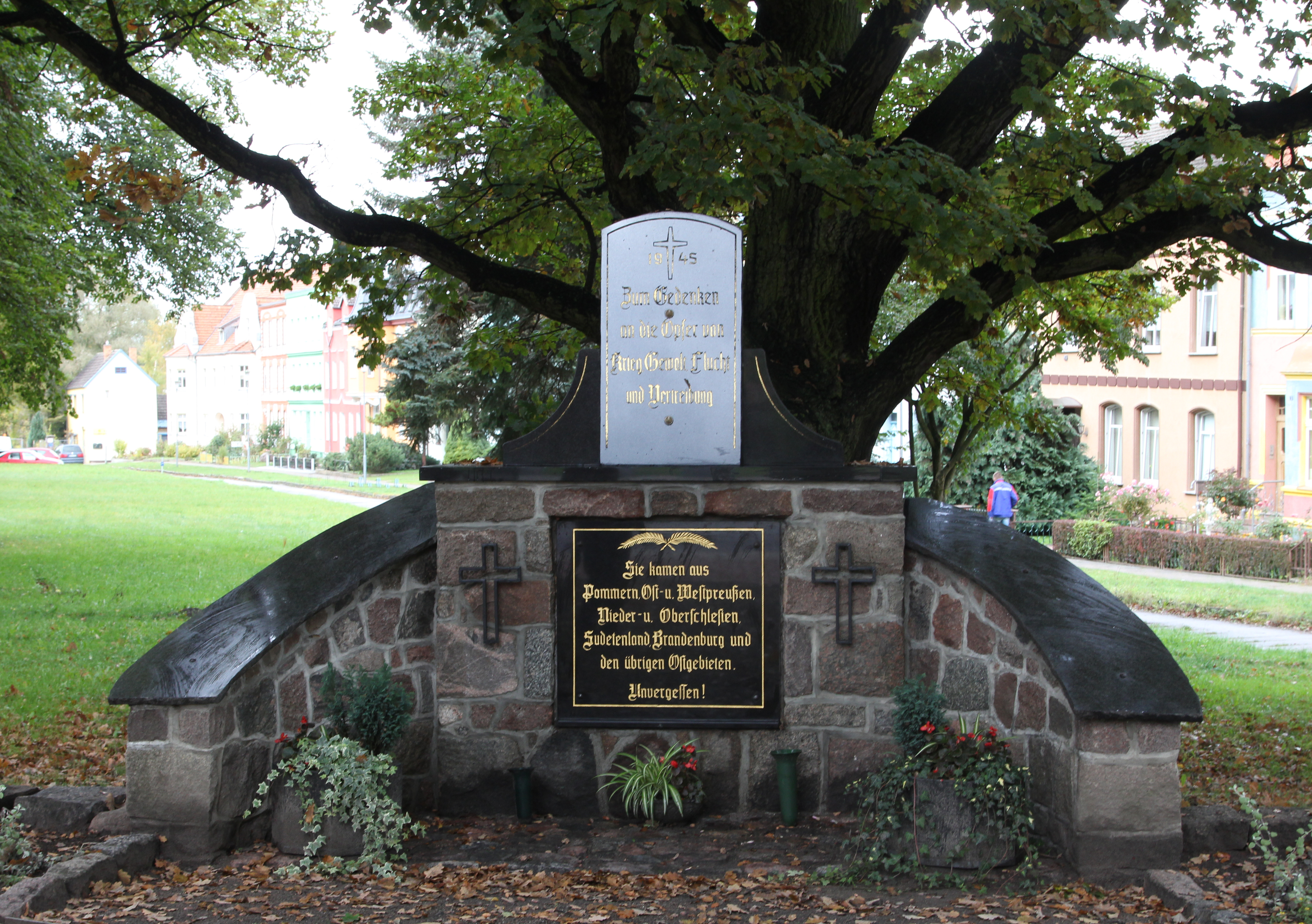 Vertriebenendenkmal in Friedland (Mecklenburg).